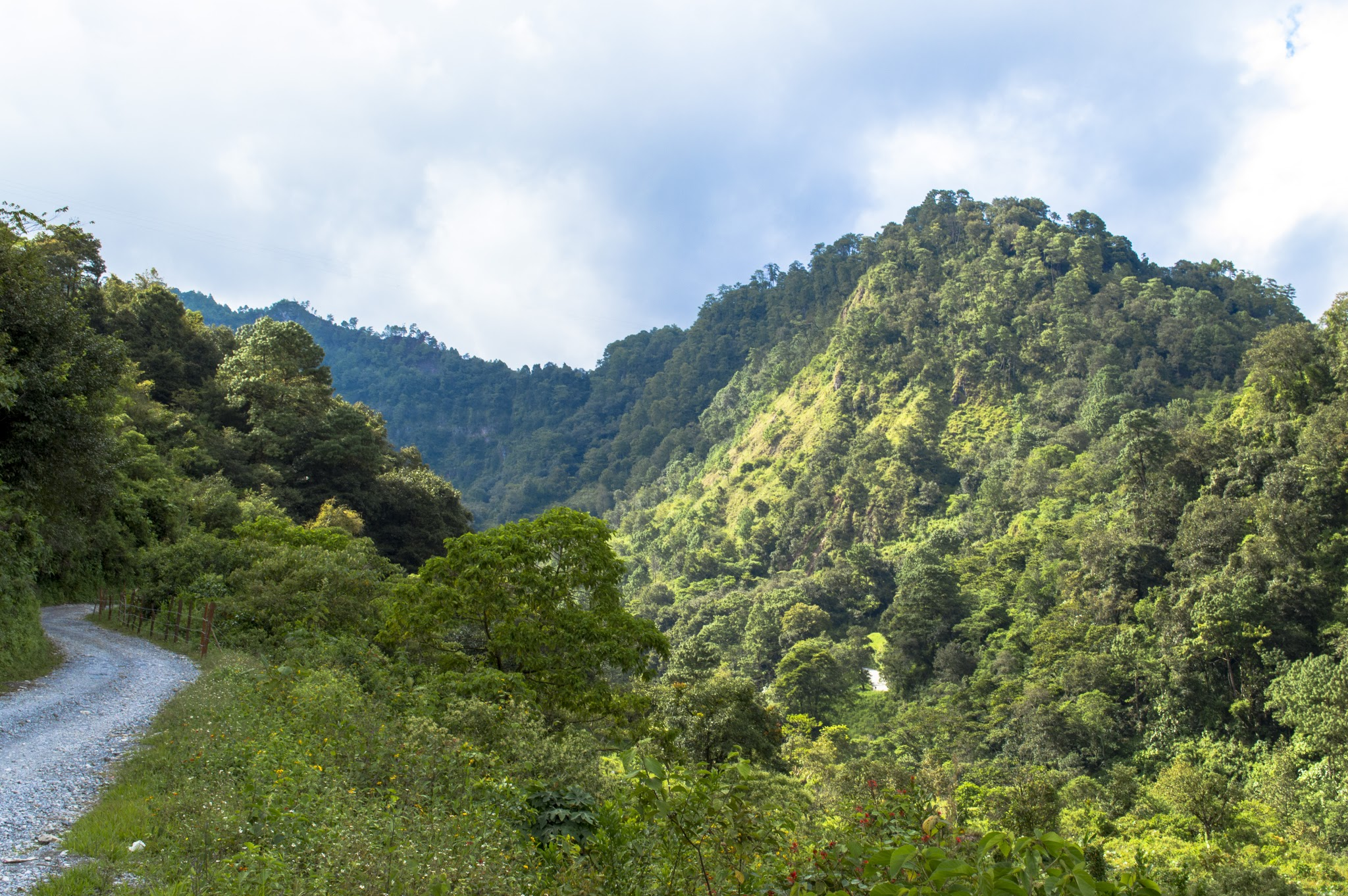 Chiconcuautla, Puebla, Mexico